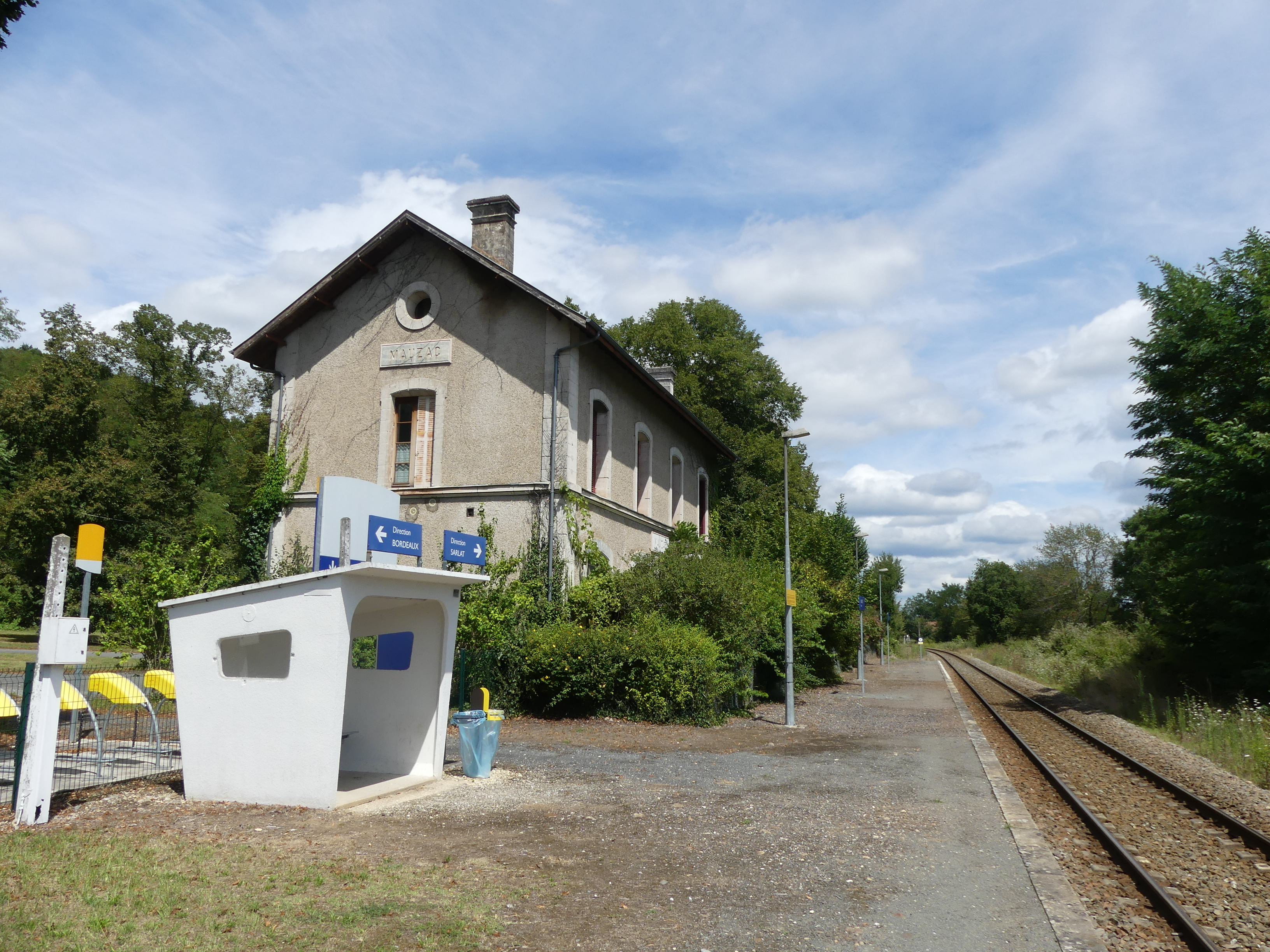 La voie en direction de Sarlat, gare de Mauzac, Mauzac-et-Grand-Castang, Dordogne, France.